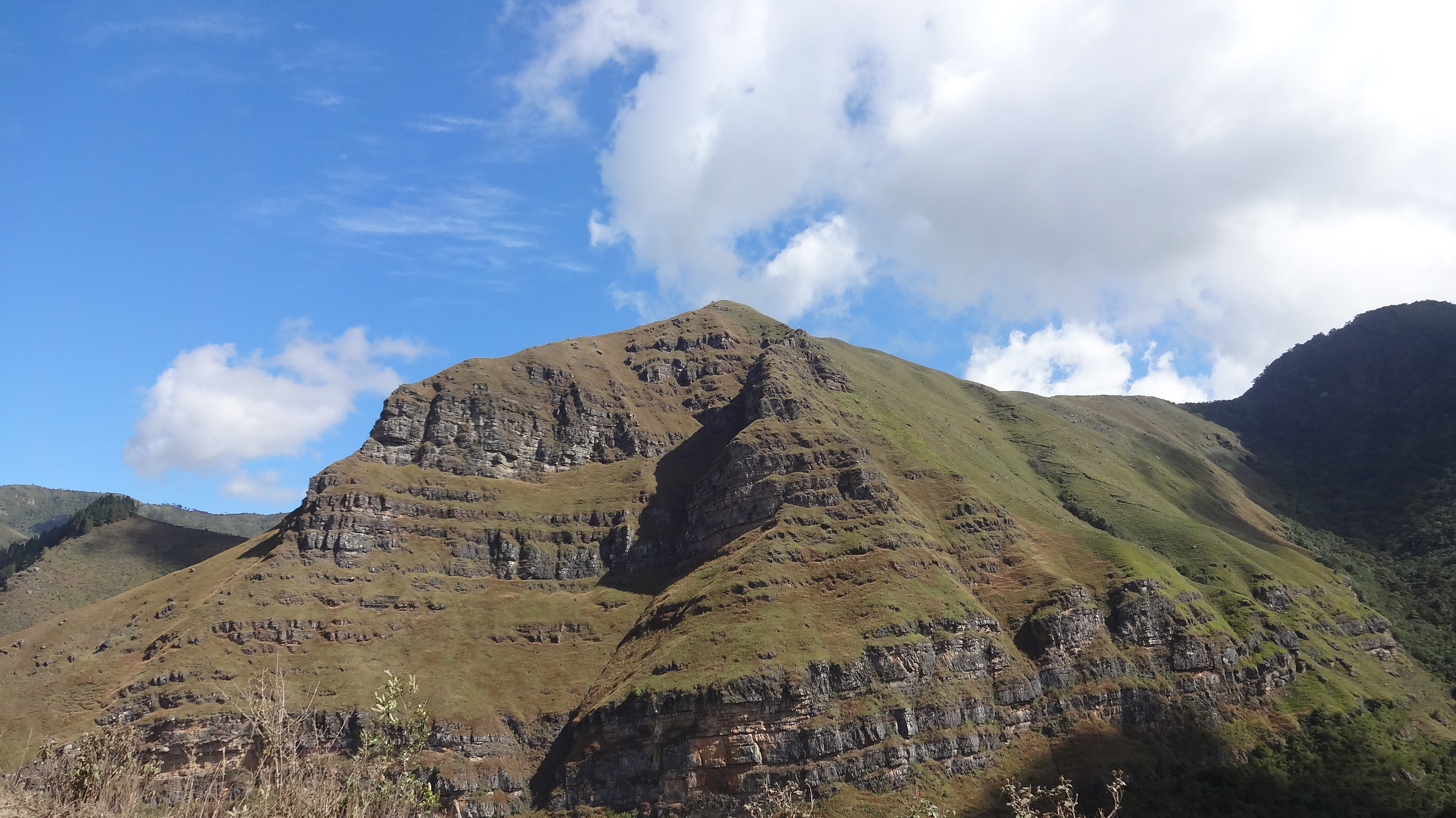 Montanas-de-Humocaro-Lara-Venezuela. Ubicado en el Municipio Morán al extremo este del parque nacional Dinira